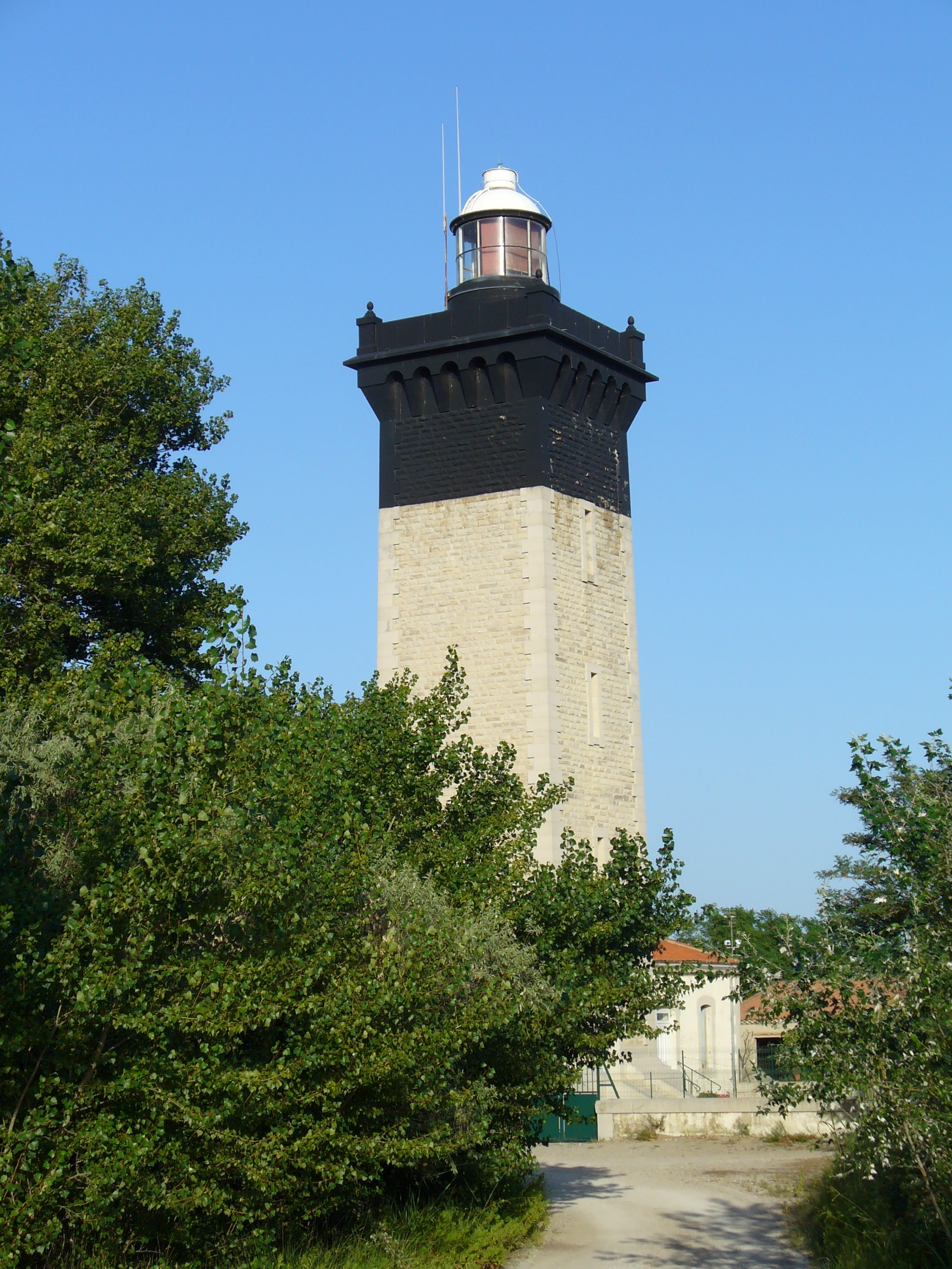 Phare de l'Espiguette Leuchtturm in Le Grau du Roi (Südfrankreich)